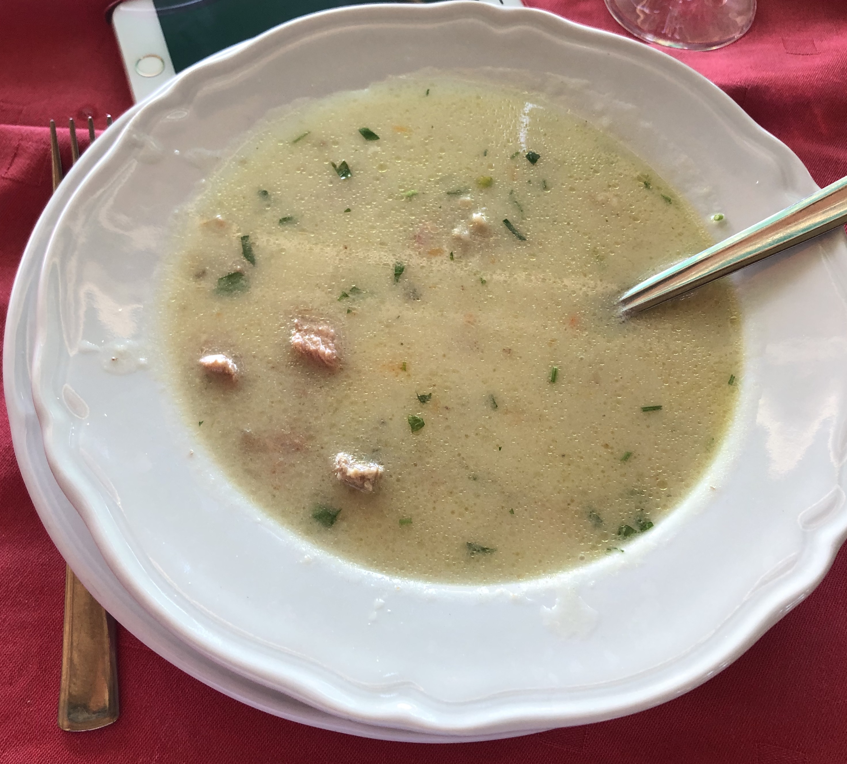 Čorba in Budva, Montenegro